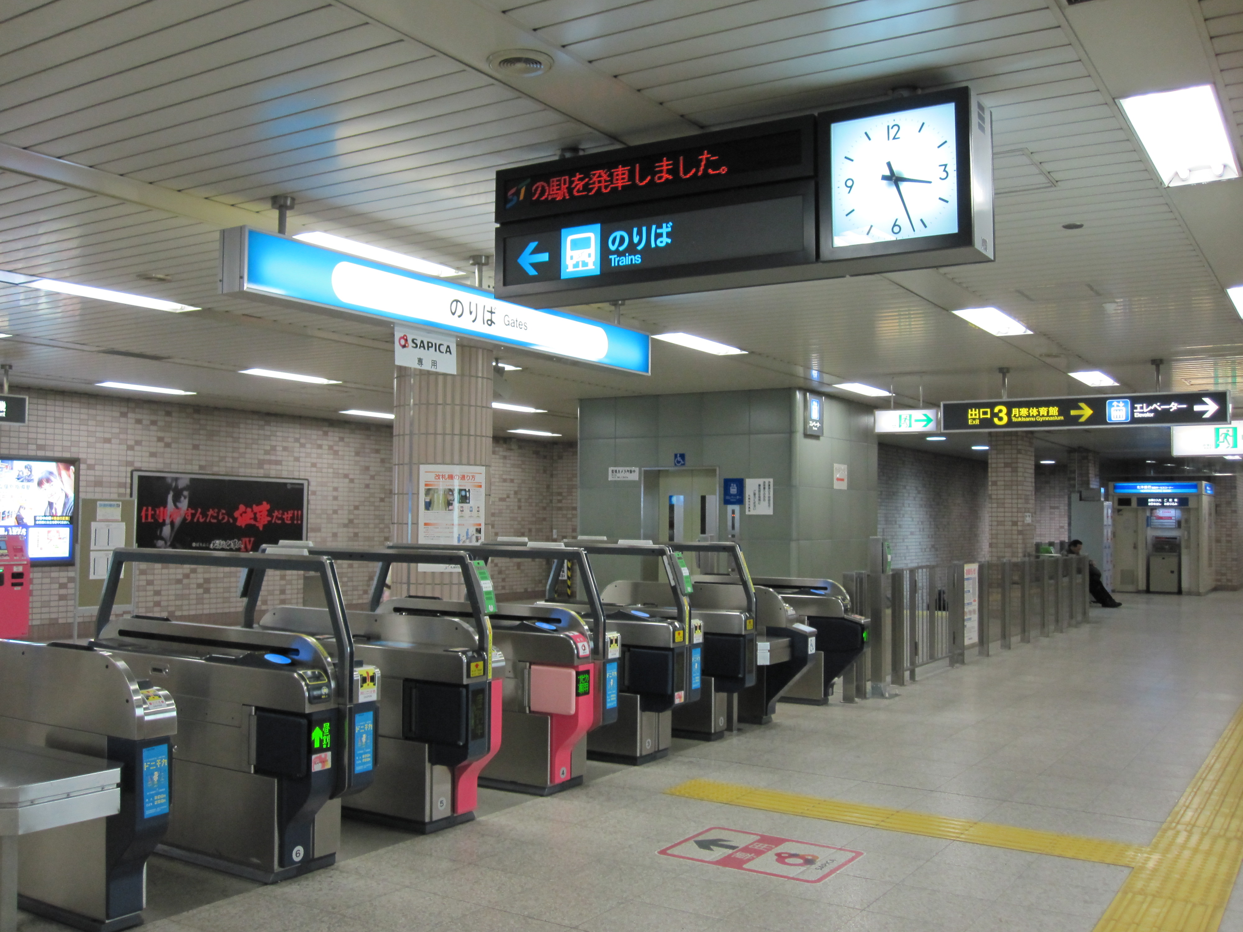 東豊線月寒中央駅改札口